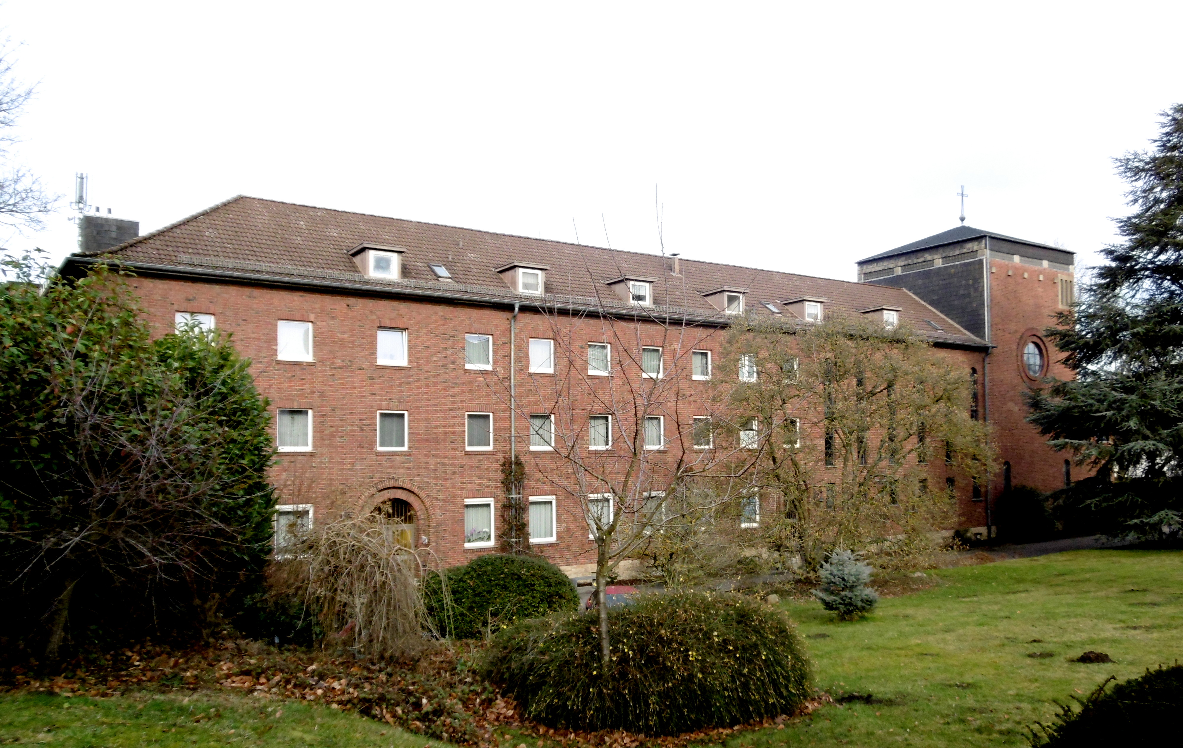 Elisabethinnenkloster Preusweg/Amsterdamer Ring in Aachen